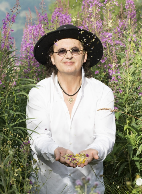 Portrait